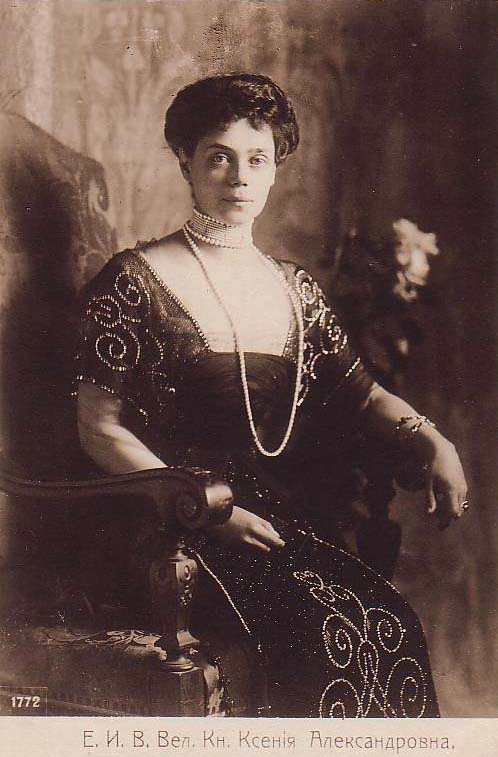 Grand Duchess Xenia